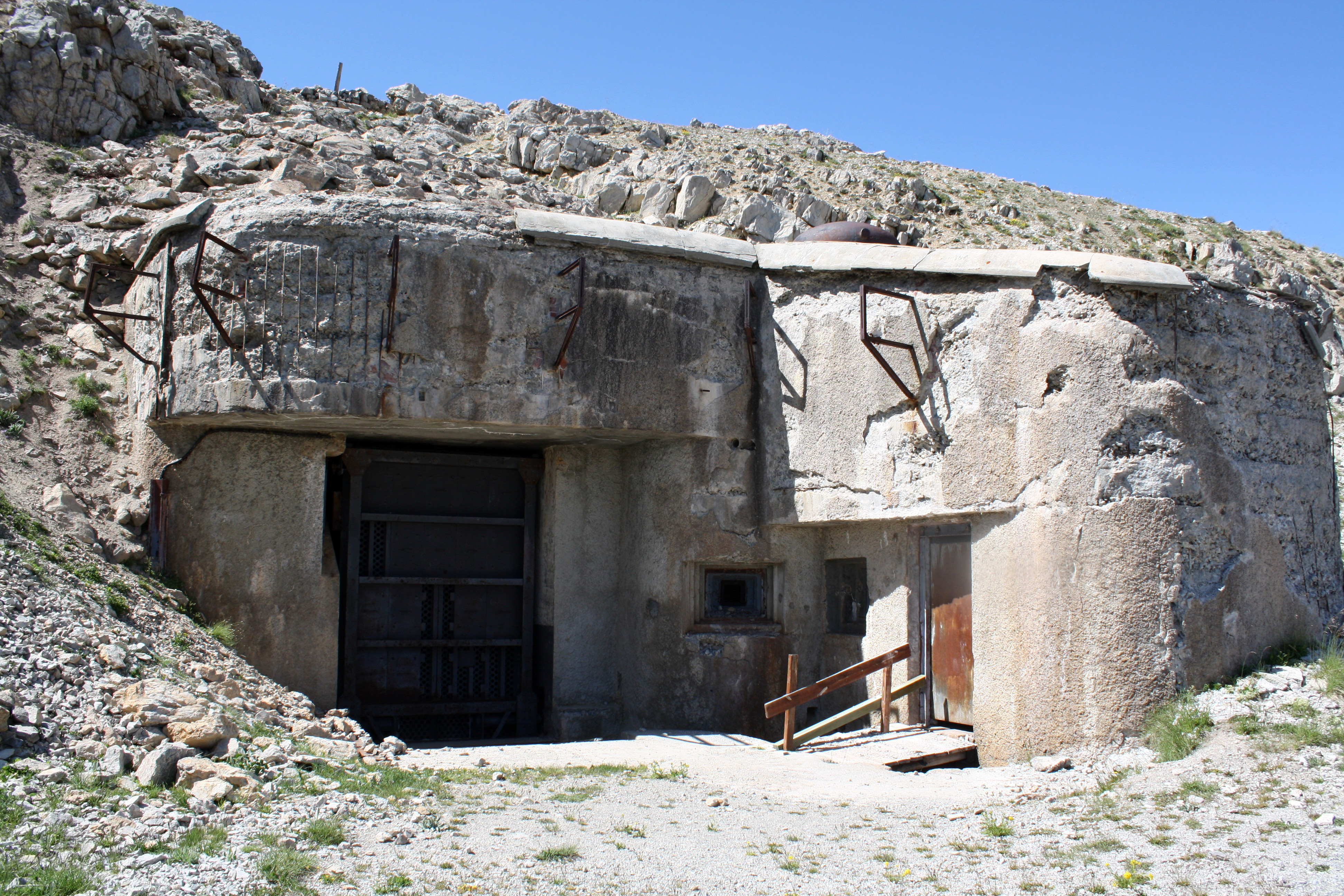 Entrée mixte